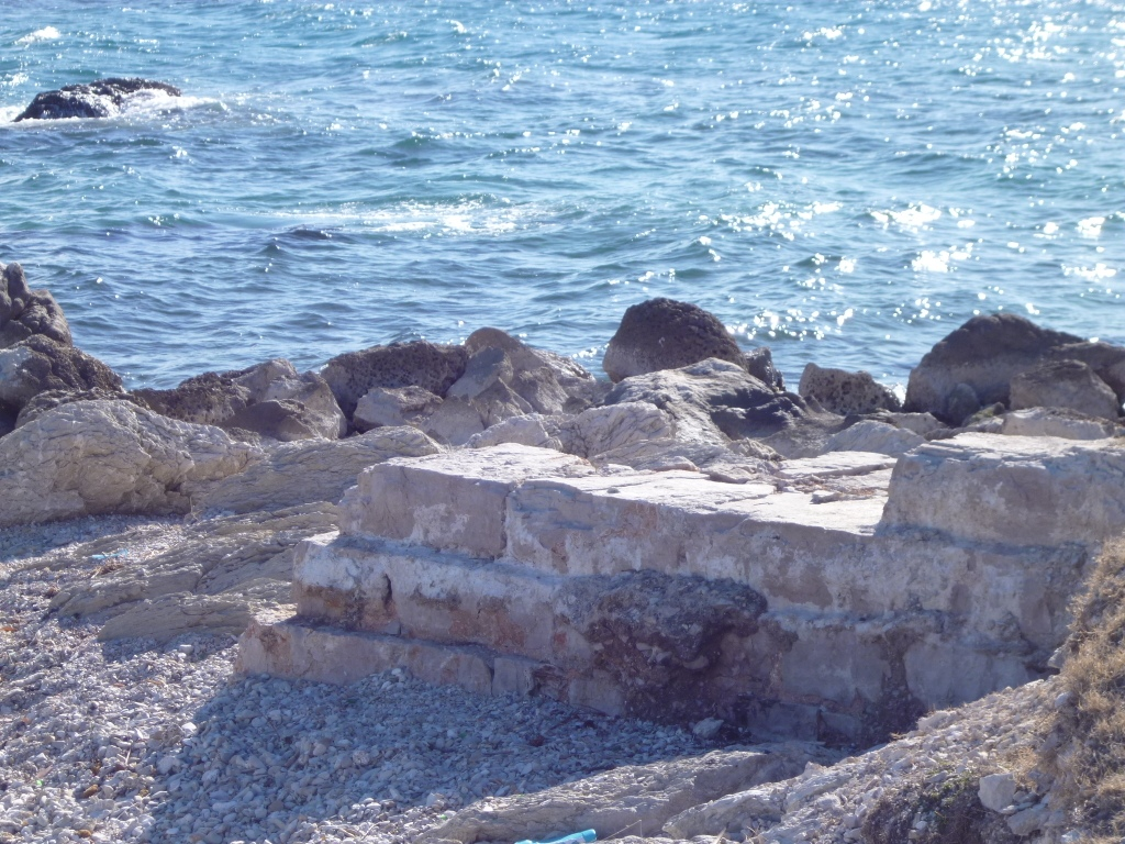 Ostaci kaštela Dragač u Kaštel Štafiliću